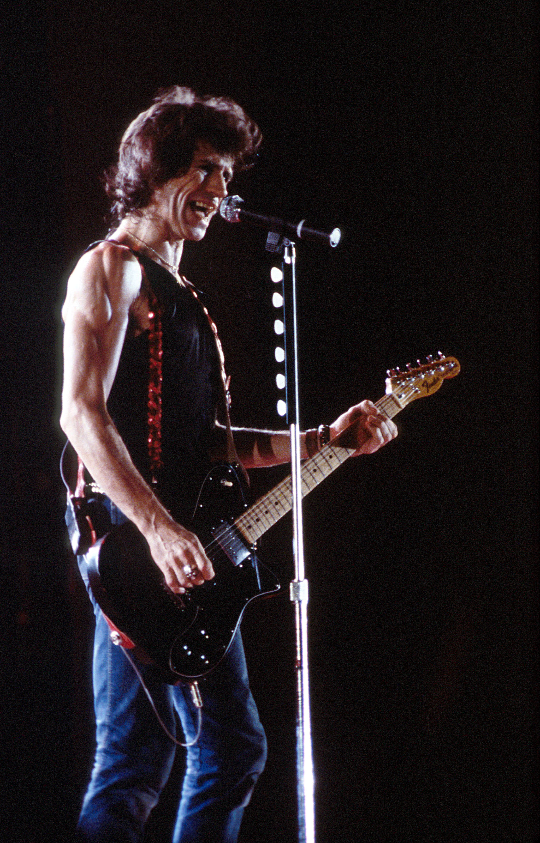 Concerto dei Rolling Stones a Torino, 1982, Keith Richards